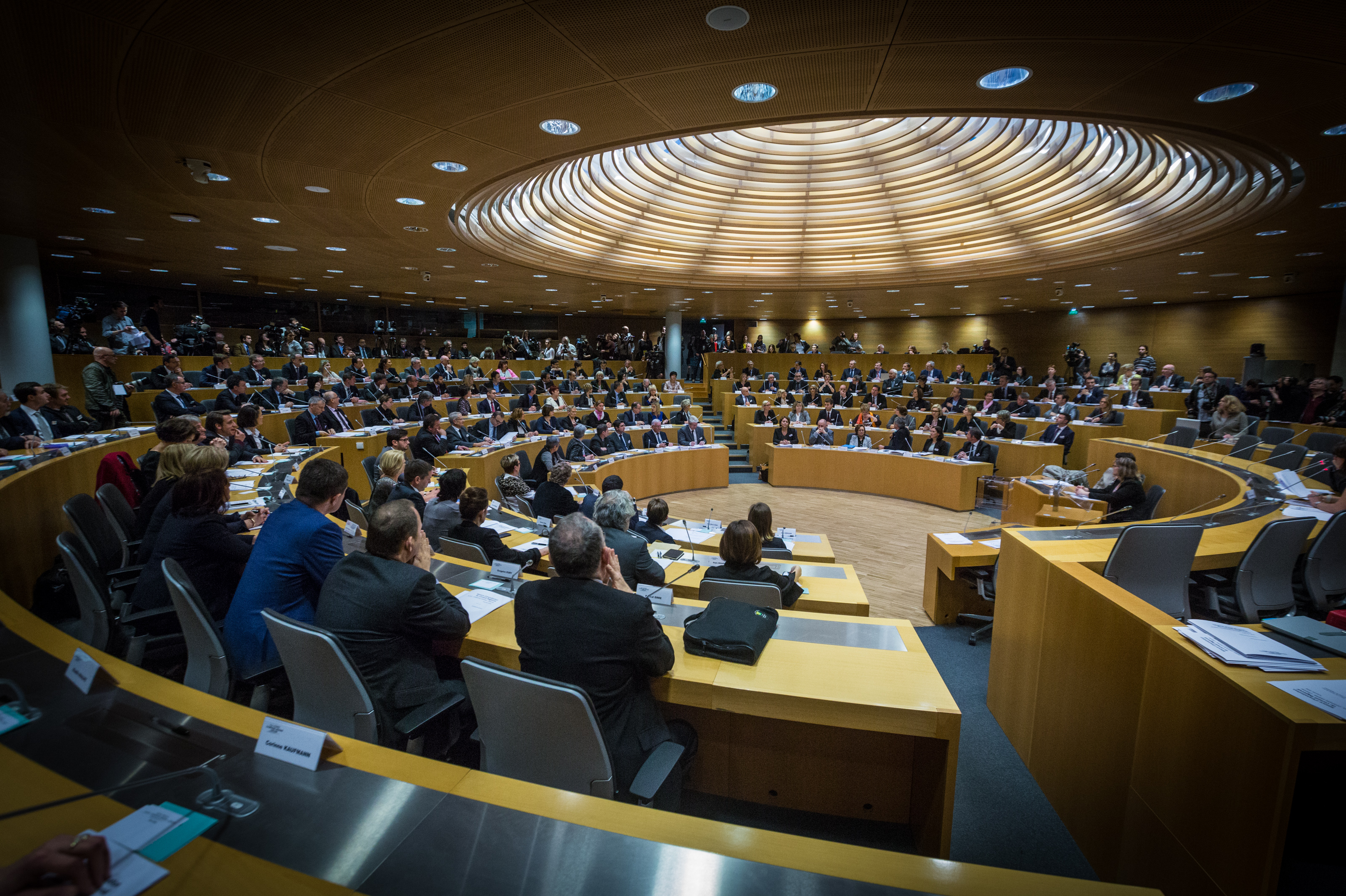 Séance plénière inaugurale du conseil de la région ACAL 4 janvier 2016.